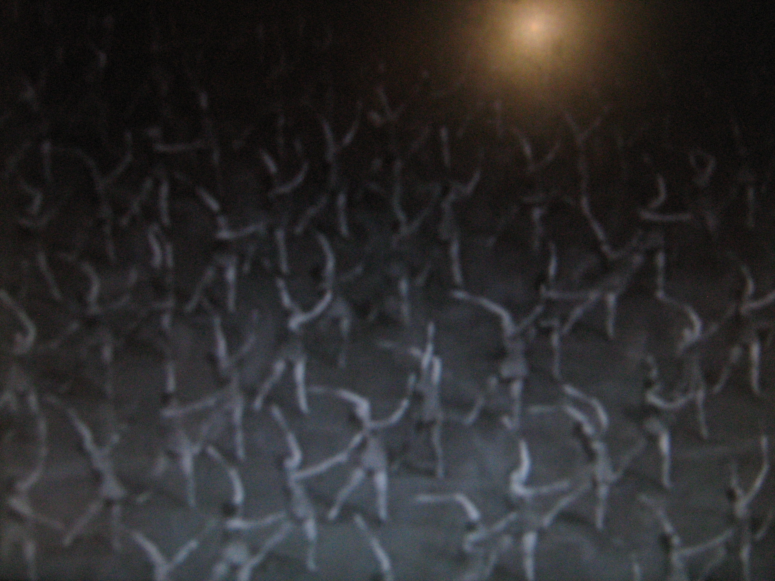 indian cubs2